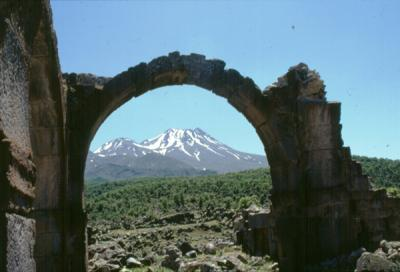 Tarihi Yeni Cami